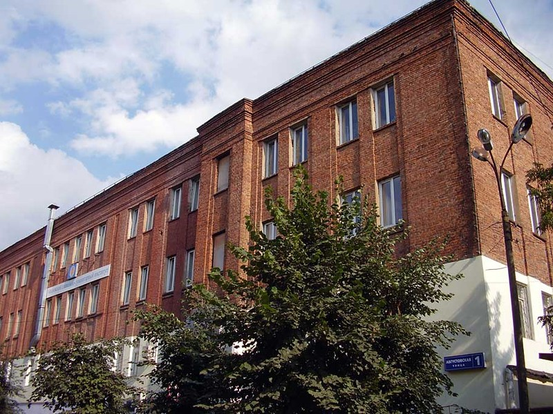 Фотография Апрелевского завода грампластинок